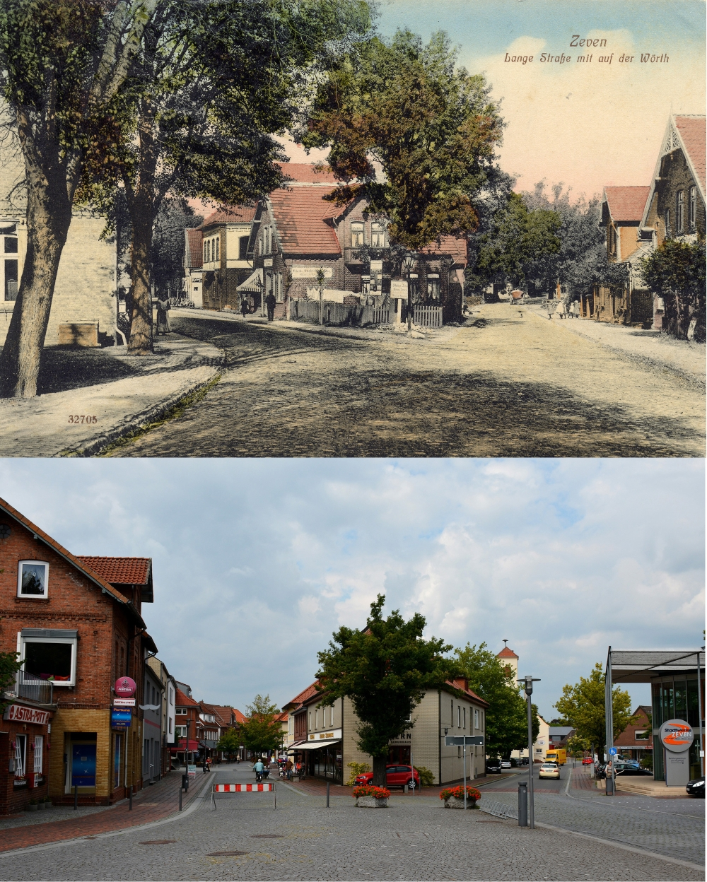 Auf der Worth in Zeven